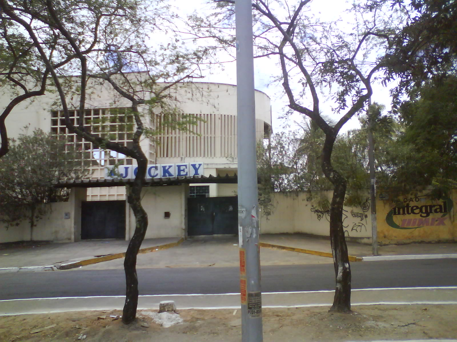 Jóquei Clube de Fortaleza, onde irá funcionar o Hspital da Mulher